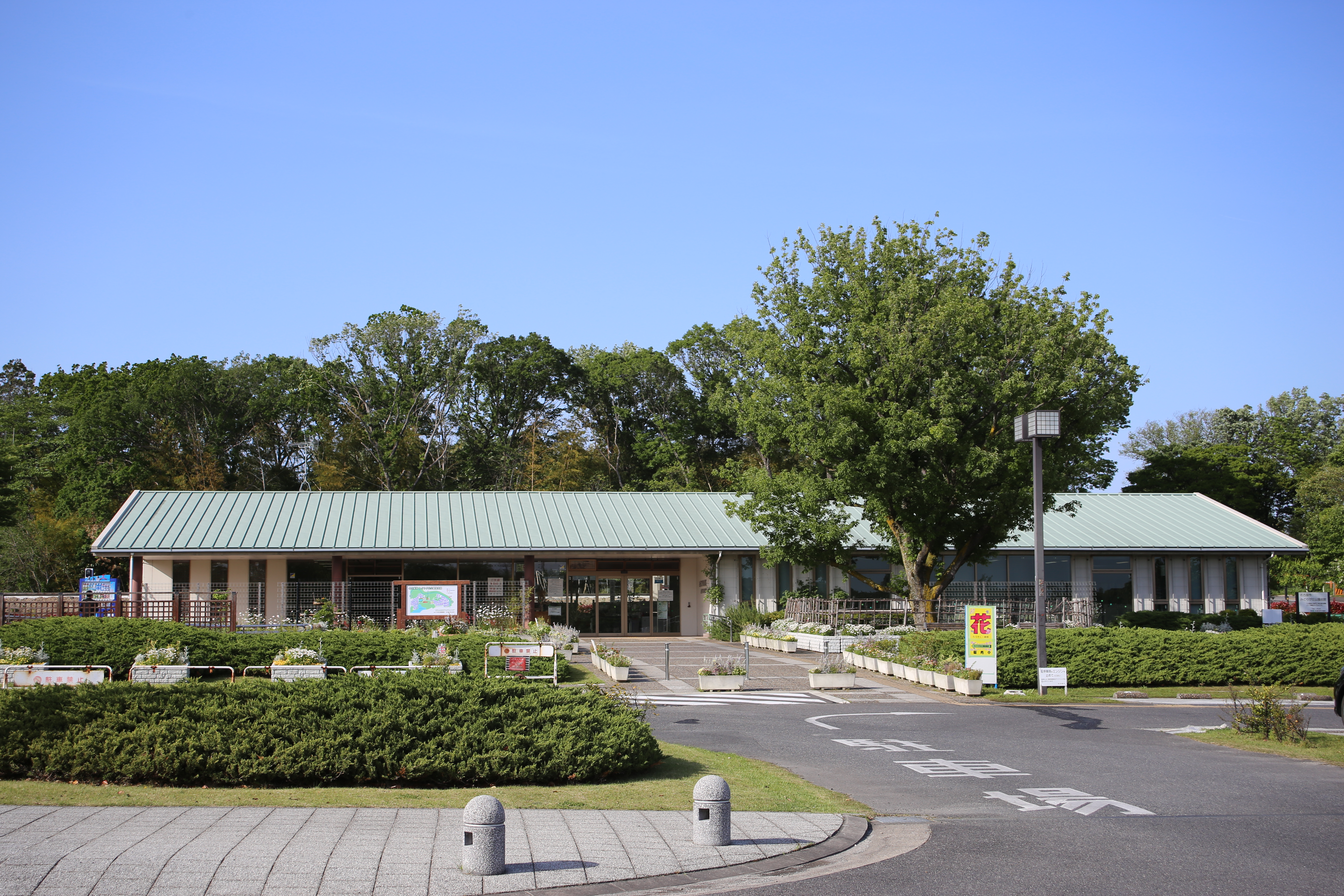 名古屋市緑区鳴海町のみどりが丘公園内にあるみどりが丘公園会館を南側道路より撮影